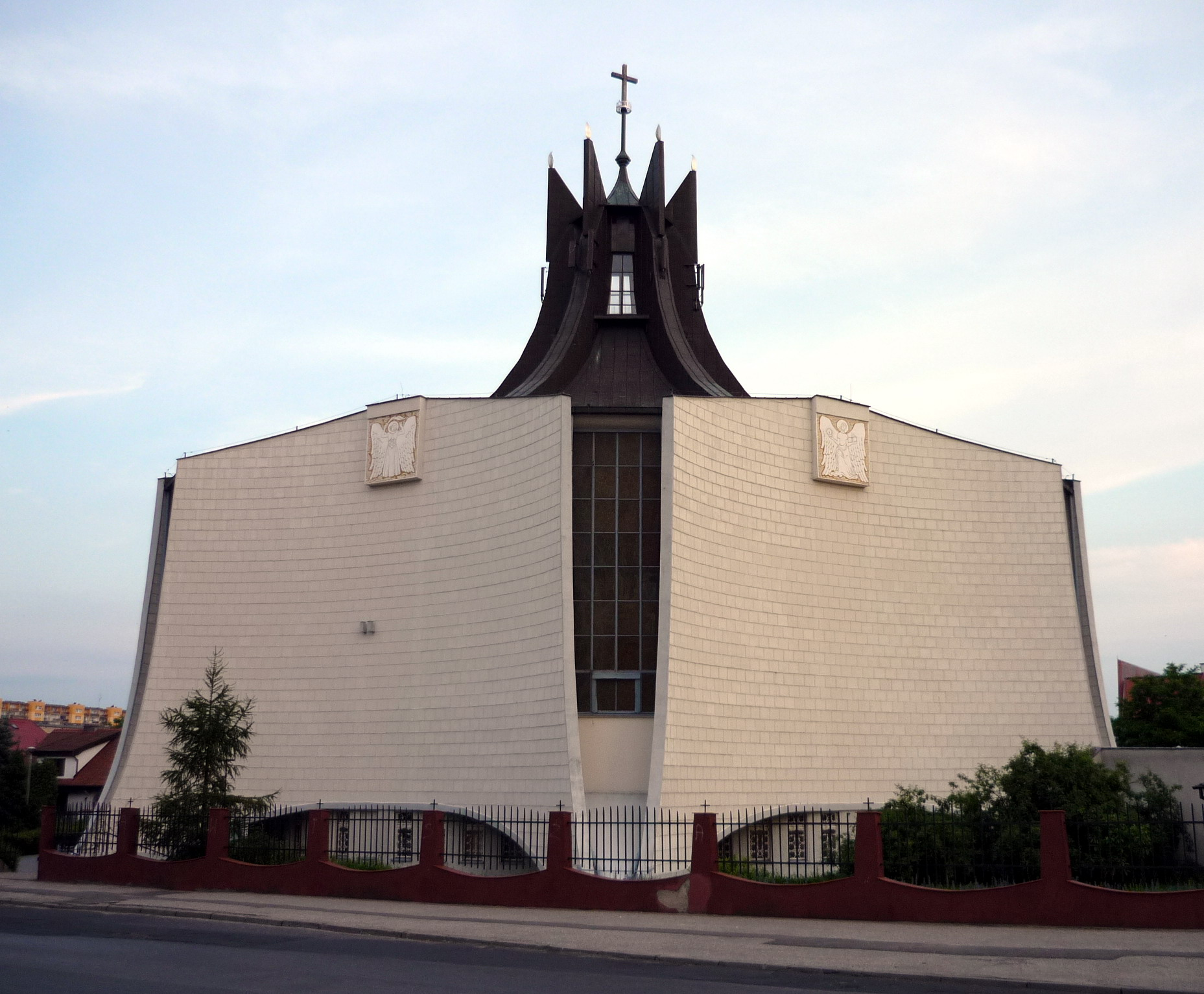 Kościół Matki Boskiej Zwycięskiej w Bydgoszczy.